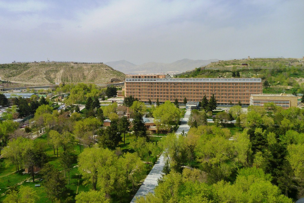 Kabul Military Hospital